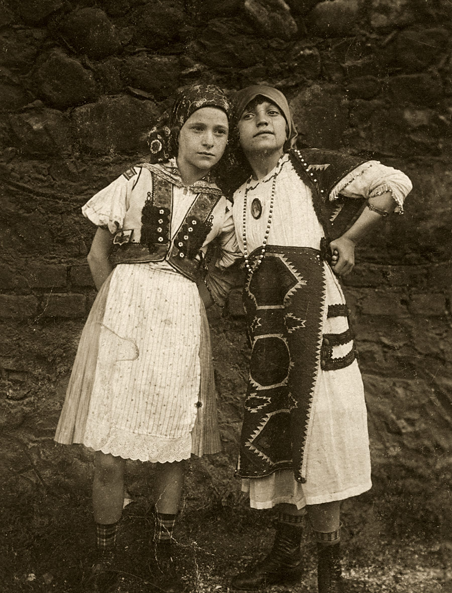 Деца, облечени вo народни носии, Прилеп 20-те години на ХХ век